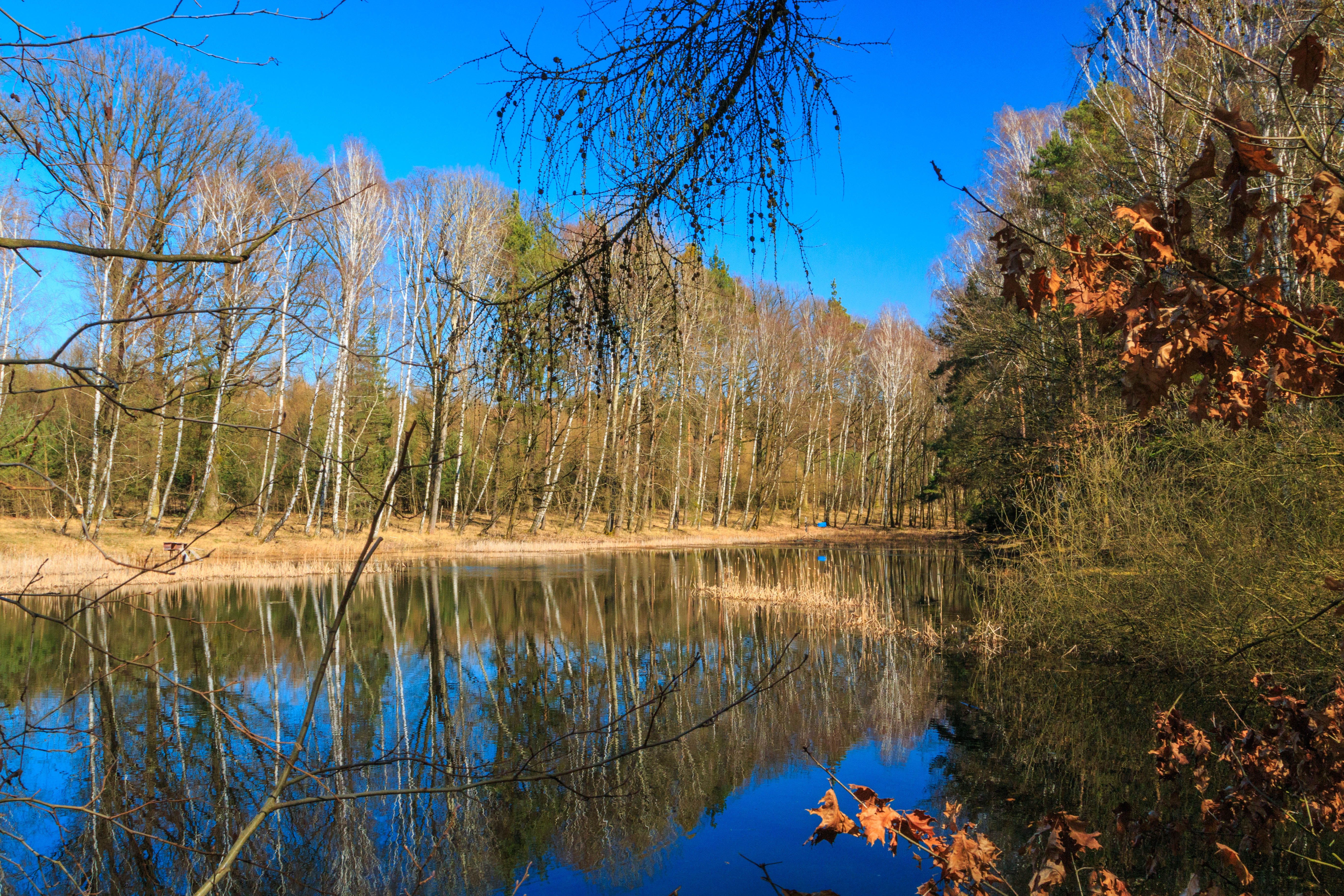 Lesní rybníček Štika u obce Kunčice v okrese Hradec Králové Project: Vodstvo.